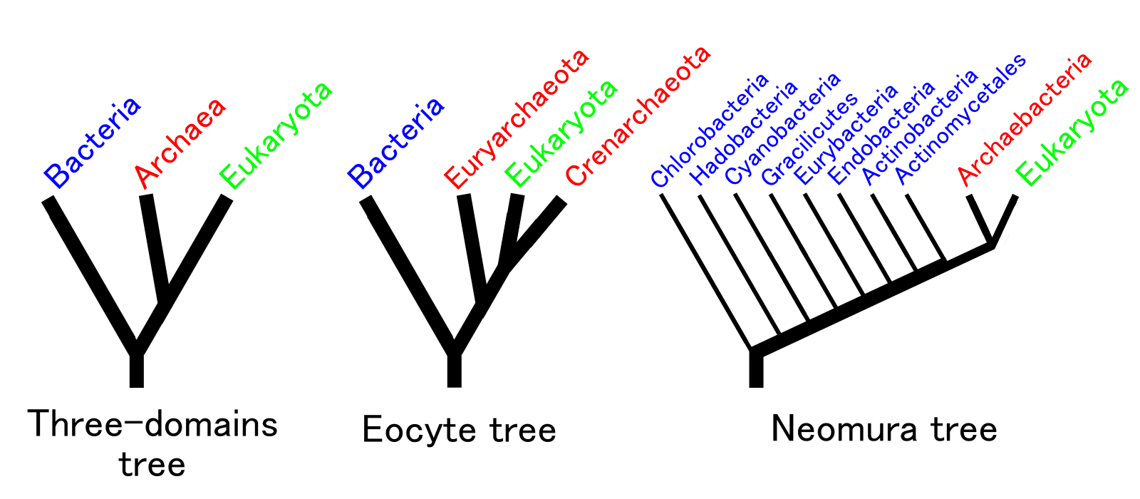 真正細菌、古細菌、真核生物の系統関係に関する主要な仮説